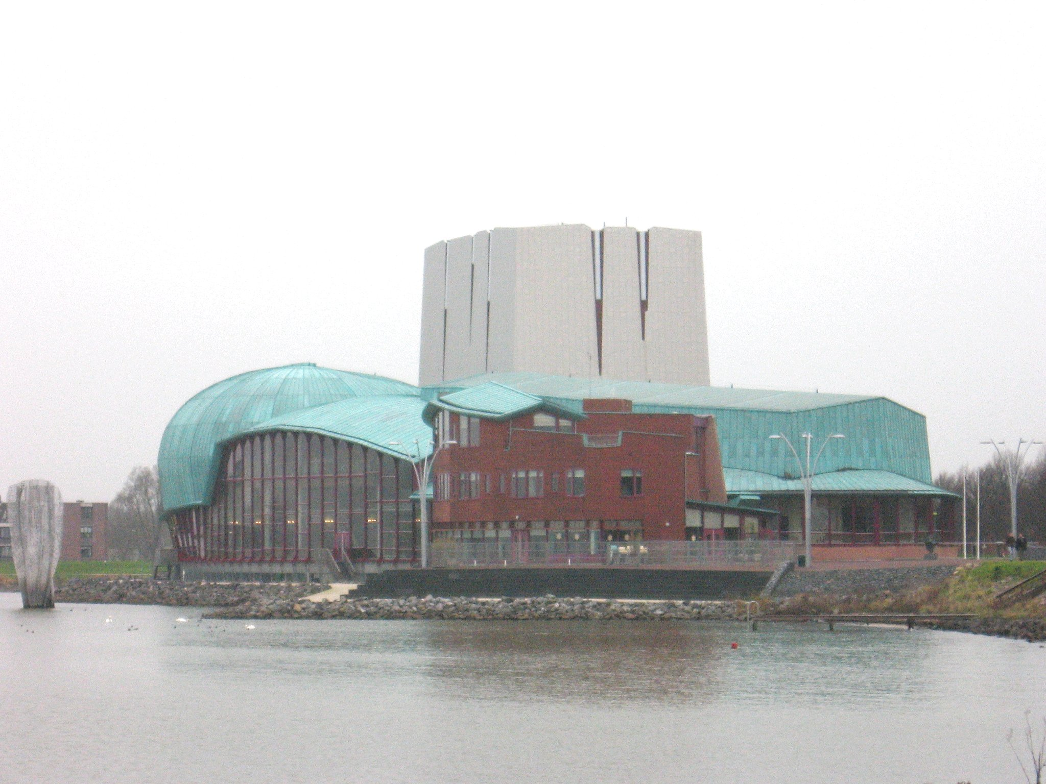 Hoorn, dec 2006